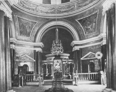 Інтэр'ер сабора Св. Іосіфа ў Магілёве. Выгляд іканастаса